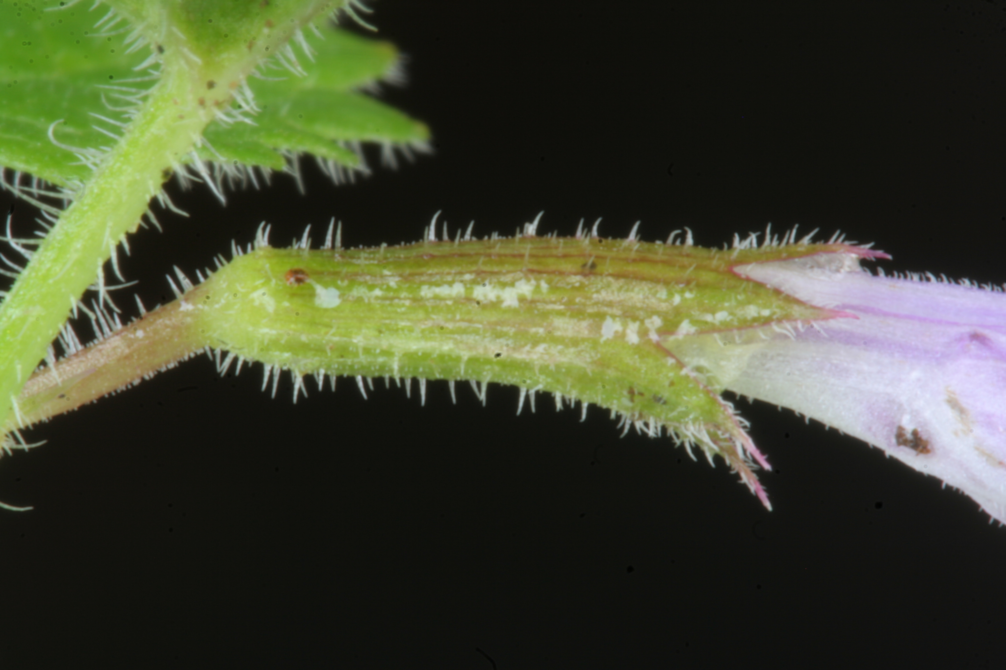 Glechoma_hederacea (Ellera terrestre comune Località: Villa Prima, Limana (BL), 350 m s.l.m.